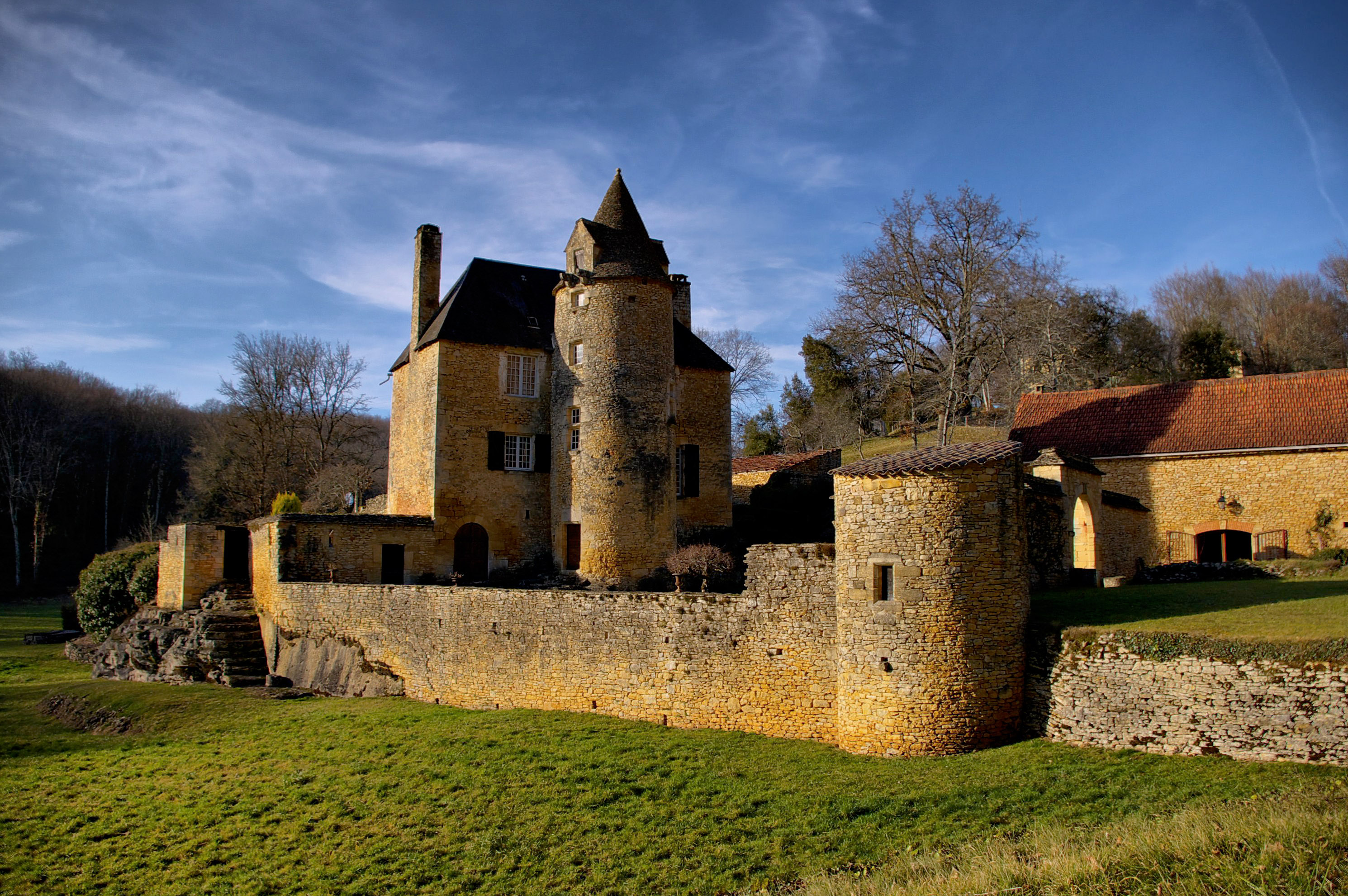 Manoir du Cluzeau, Proissans.